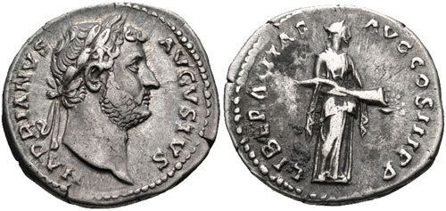 Изображение Адриана на монете с сайта